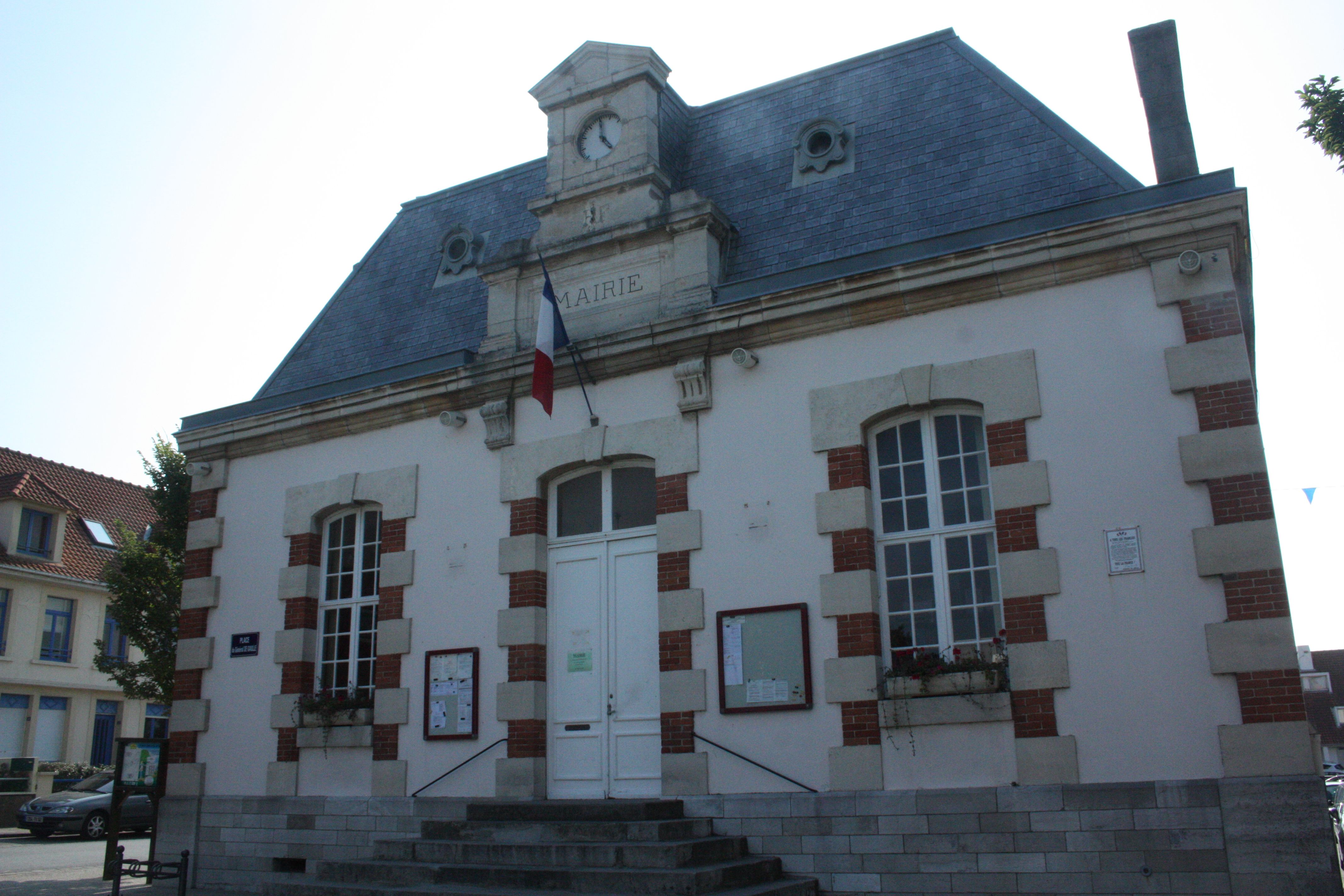 Façade avant de la Maire de la Commune de Wissant